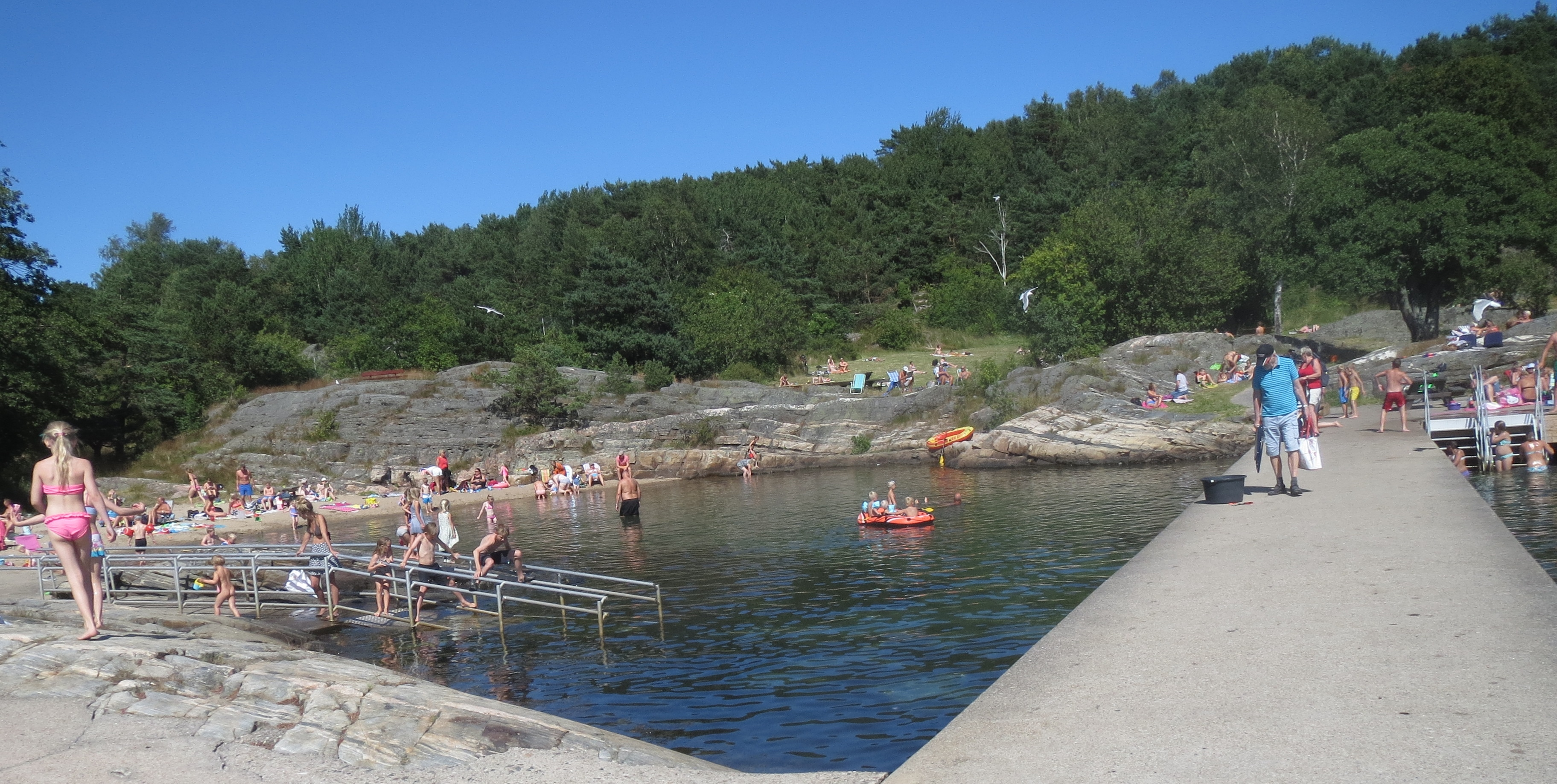 Bertesbukta i Kristiansand 2015